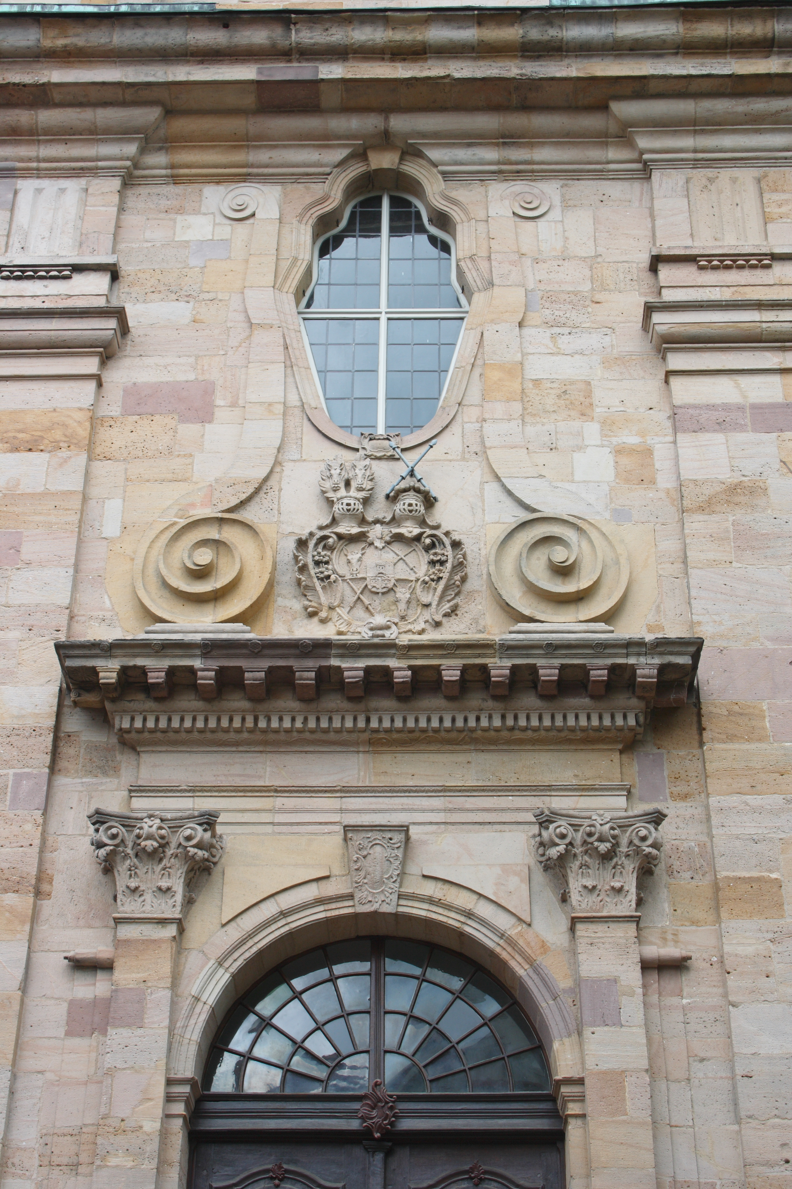 Evangelische Stadtkirche in Lauterbach (Hessen) am Marktplatz 10, Portalfassade